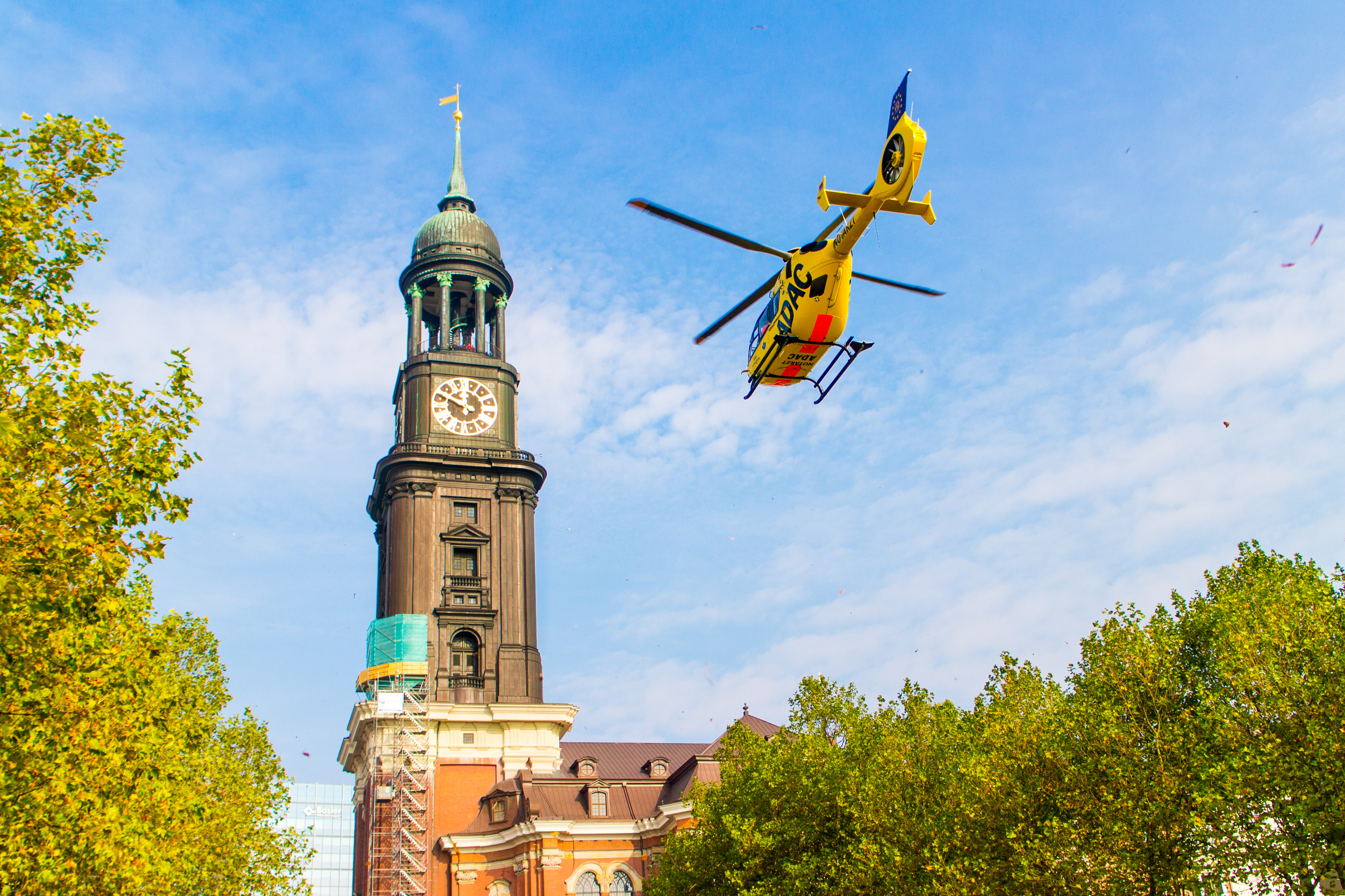 Christoph Hansa vor dem Michel D-HHBG